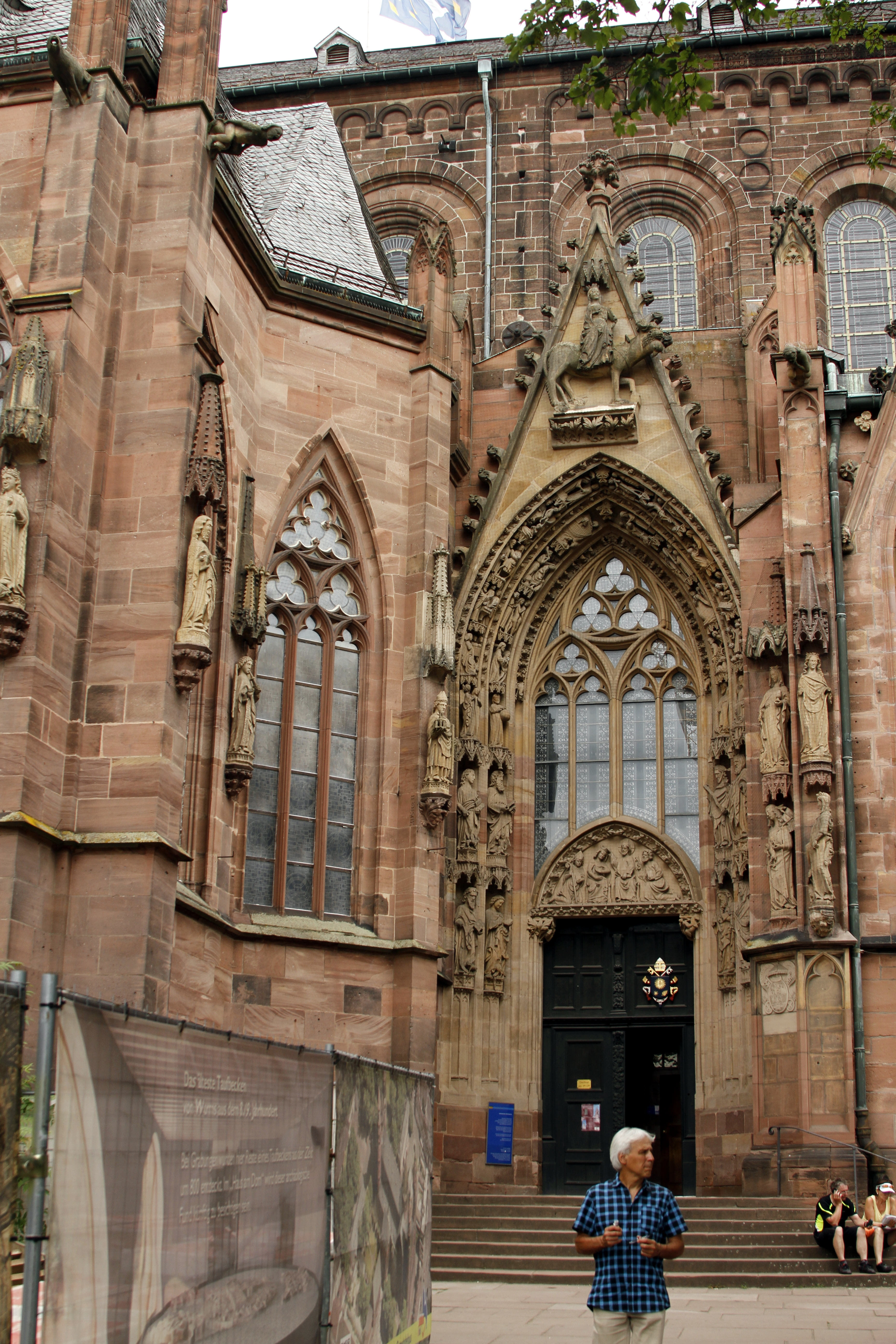 Worms Cathedral - Worms - Germany